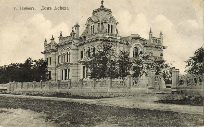 Россия. Тамбов. Дом Асеева. (открытка). 1910-1915гг.